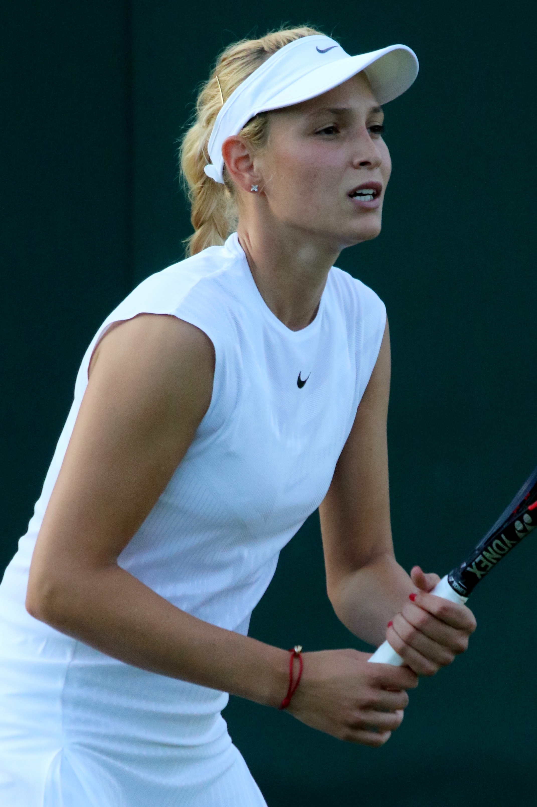 Vekic WM17 (20)